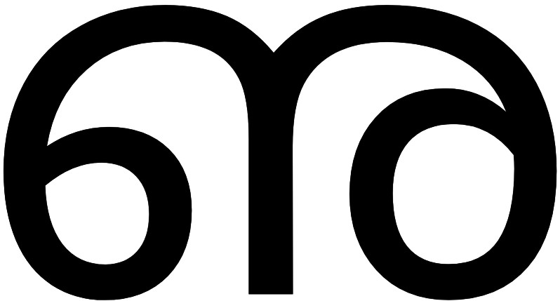 ഌ അക്ഷരം